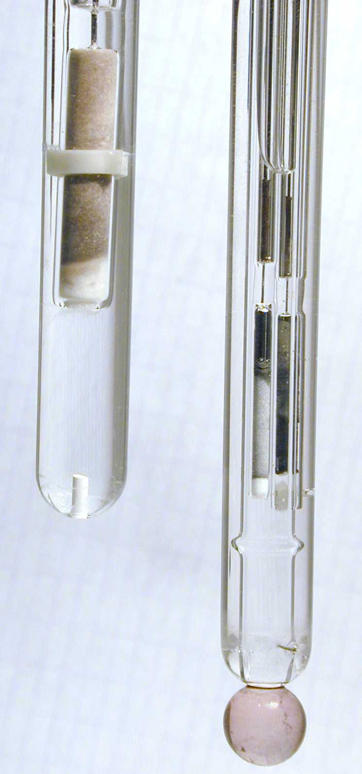 silver-silverchloride reference electrode and pH glass electrode